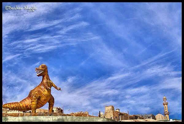 تمثال ديناصور نالوت اللاحم في مدخل المدينة